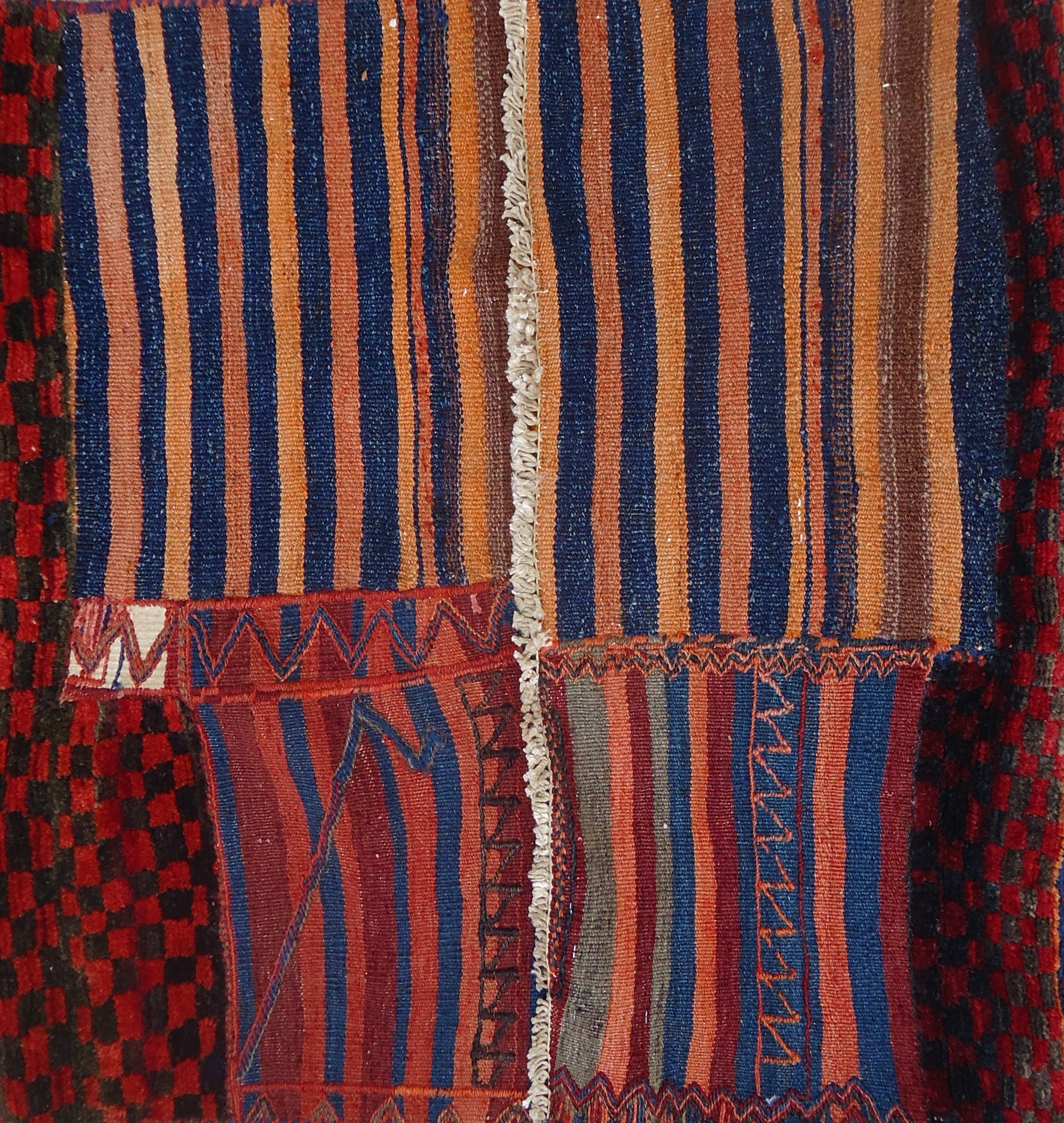 Notare il motivo a torre di piccioni, a quadretti rossi e neri. Sacca doppia, artigianale, in tessuto, usata per il trasporto di granaglie o di farine. Secolo XX.